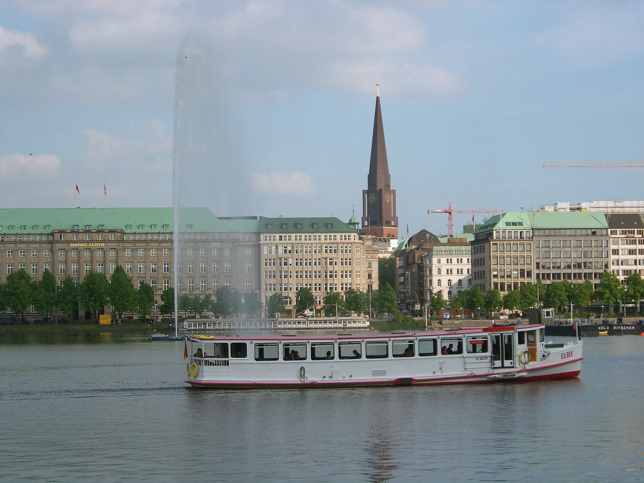 Hamburg, Binnenalster, Alsterdampfer "Eilbek". Im Hintergrund St. Jacobi. This is a photograph of an architectural monument.